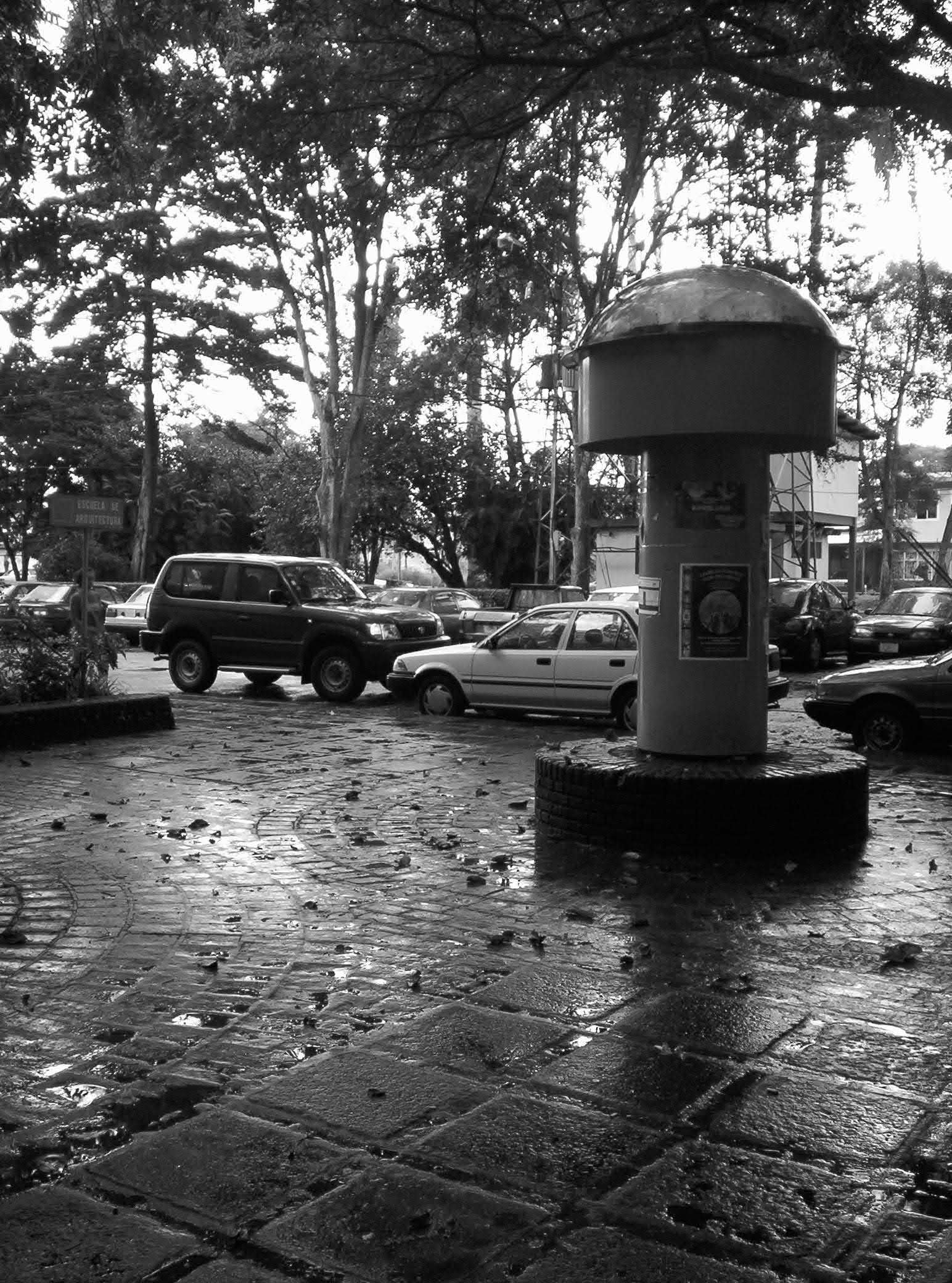 Un día de lluvia en la Escuela de Arquitectura de la Universidad de Costa Rica, diseñada por el arquitecto costarricense Édgar Brenes. La imagen fue captada en la estación lluviosa del año 2005.